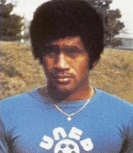 Jacques Zimako en 1975, 'Ageducatifs Football 1975 - 1976', Panini figurina n°31.